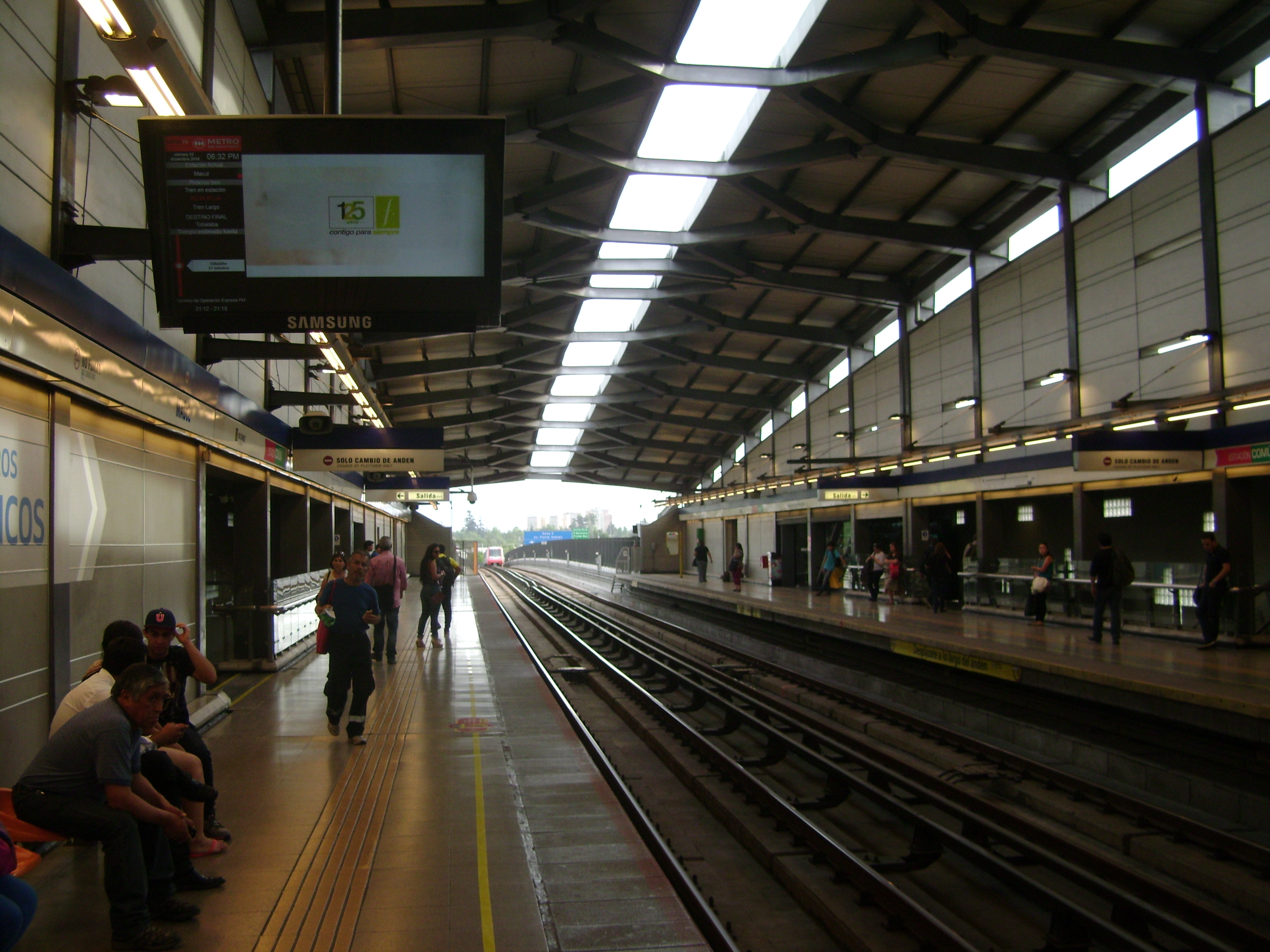 Metro de Santiago, Estación Macul, interior de andenes